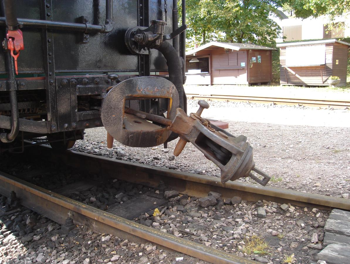 Adapter zwischen Mittelpuffer- und Scharfenbergkupplung (sogenannter Elefantenkopf)